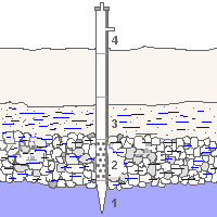 Rammbrunnen Schlagbrunnen Abessinierbrunnen